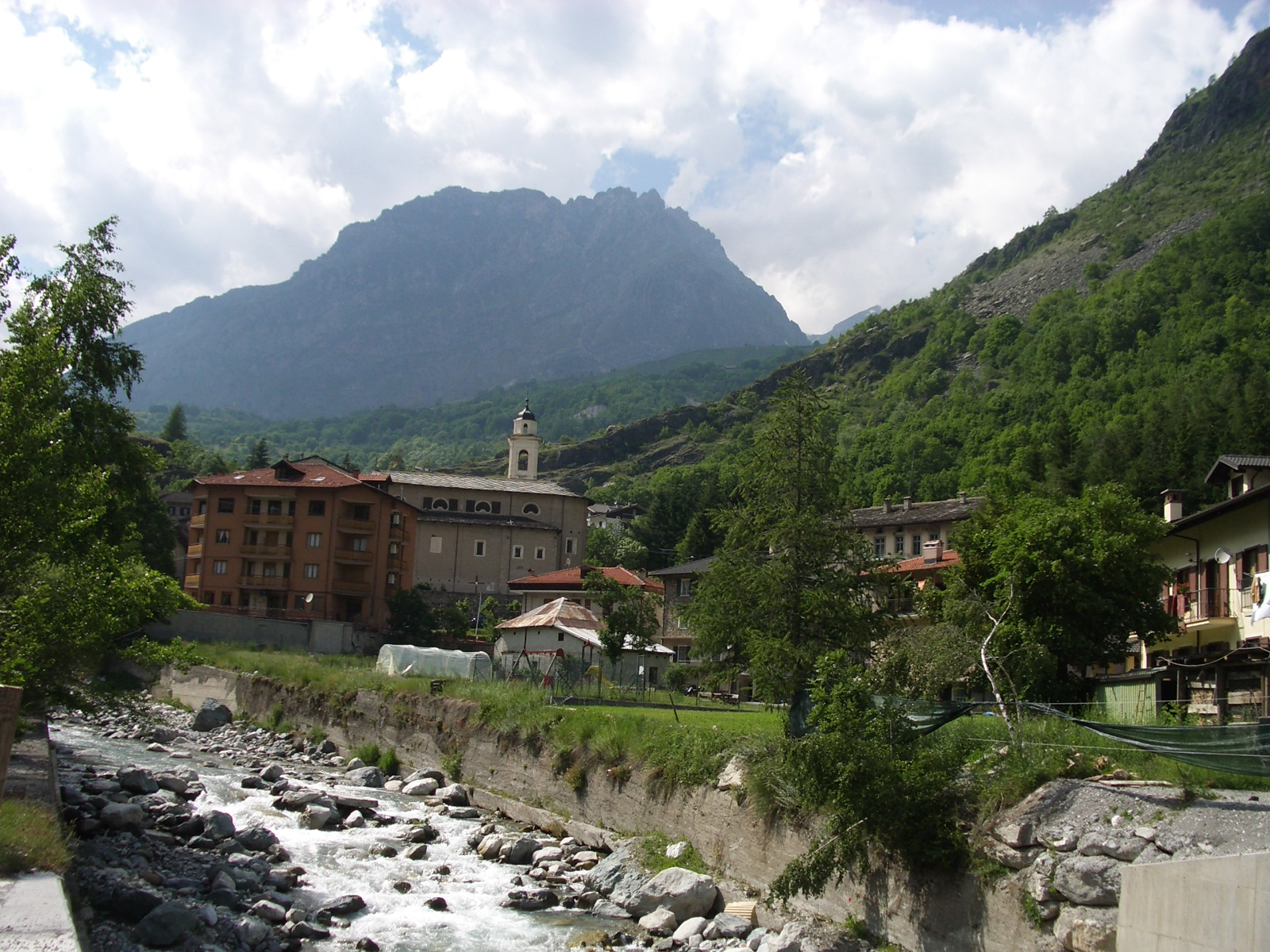 Acceglio, Maira Valley, Italy